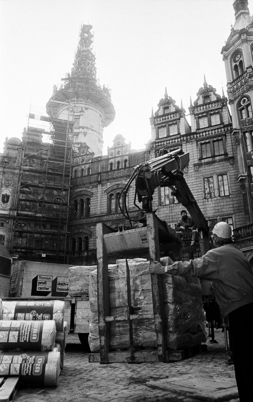 Schwerin, Schloßsanierung ADN/Pätzold/ 7.4.90 Schwerin: Schloßsanierung, Eine erste Lieferung dringend benötigter Materialien und Ausrüstungen für Bauvorhaben am Schloß sind aus dem schleswig-holsteinischen Raisdorf eingetroffen, wo Ende 1989 etwa 25 Unternehmen aus Kiel und Umgebung einen Förderverein gegründet hatten. Mit 500.000 DM unterstützt er die Sofortmaßnahmen, die den Verfall des historischen Bauwerkes stoppen sollen.